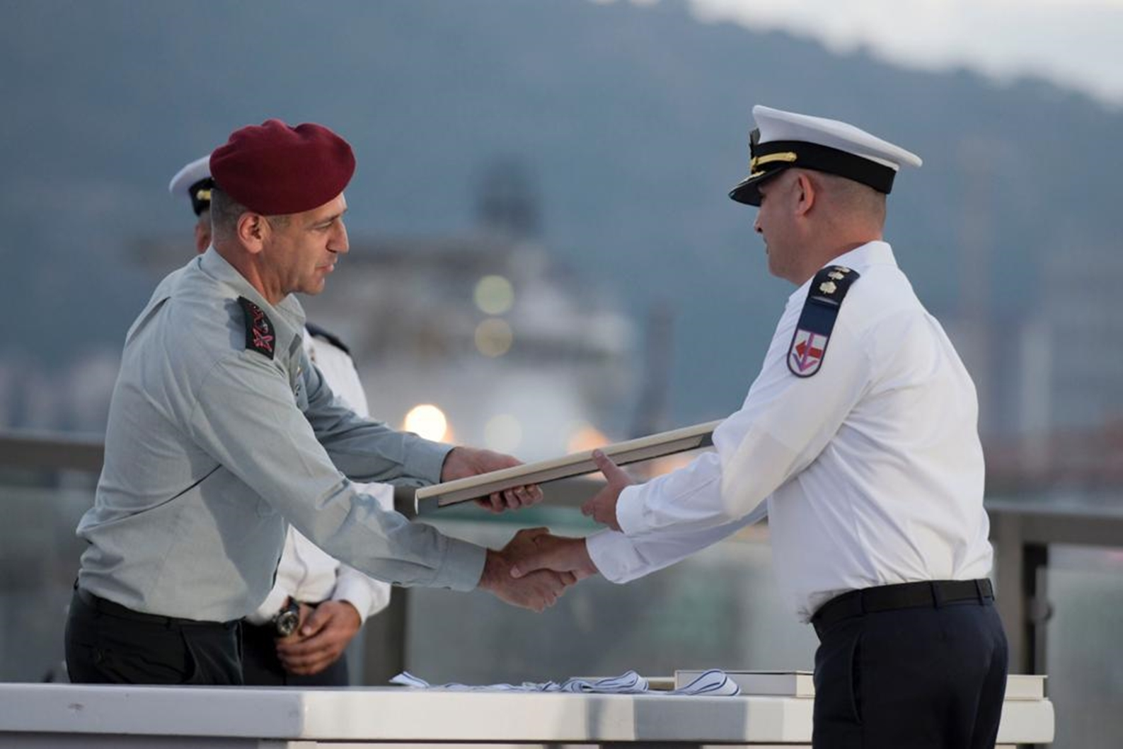 הרמטכ"ל רב אלוף אביב כוכבי מוסר כתב הערכה למפקד שייטת ספינות הטילים אל"מ גיא גולדפרב יולי 2019